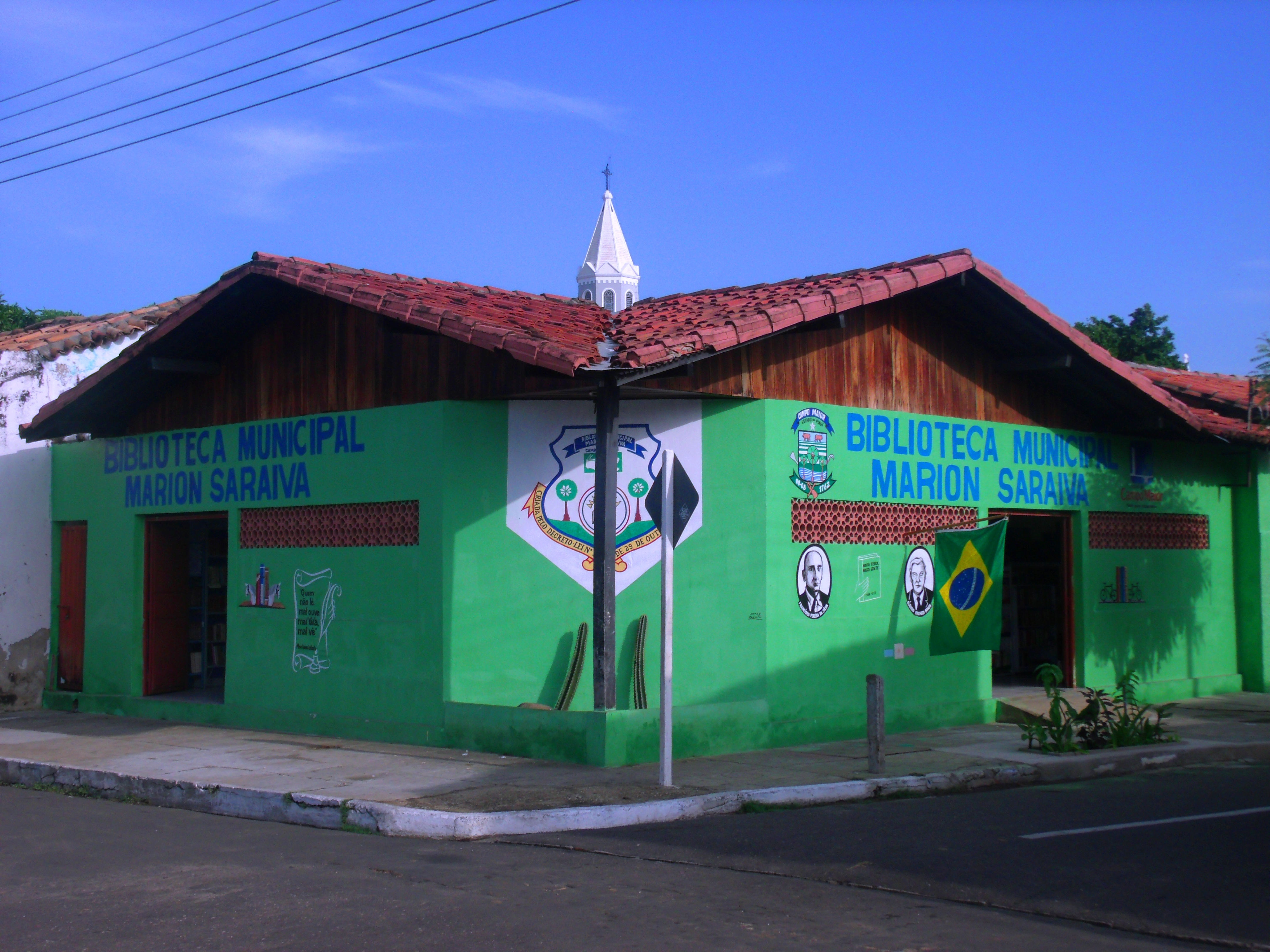 Frontarias do prédio da Biblioteca Mública Municipal de Campo Maior, no Piauí, em fevereiro de 2016.